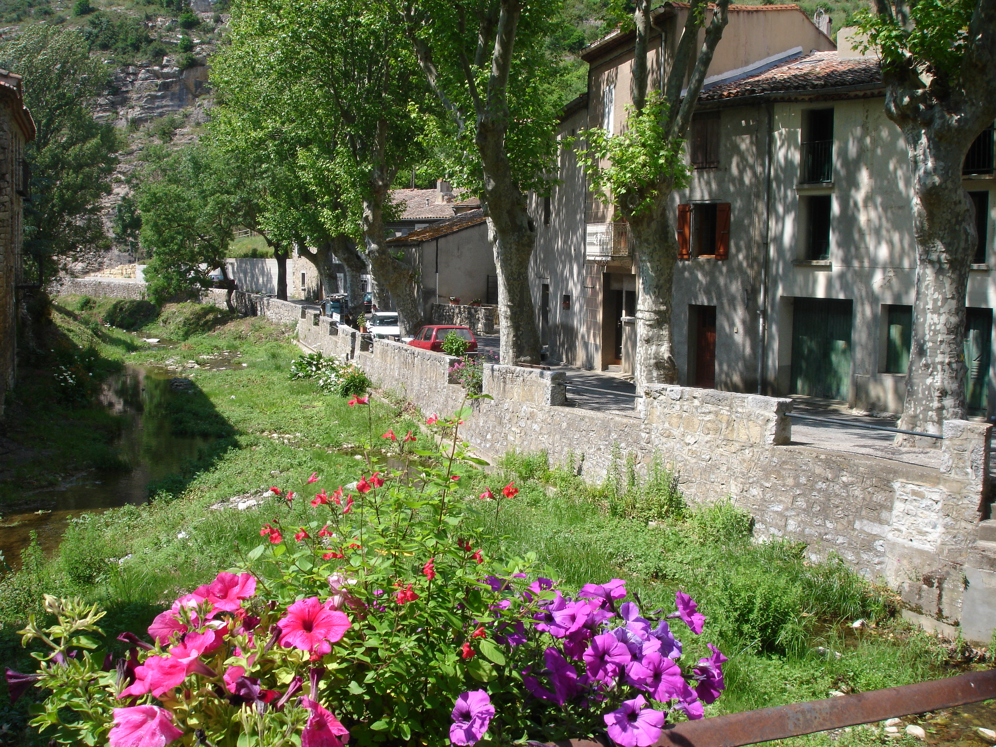 France, Aude (11), Termes sur l'Orbieu